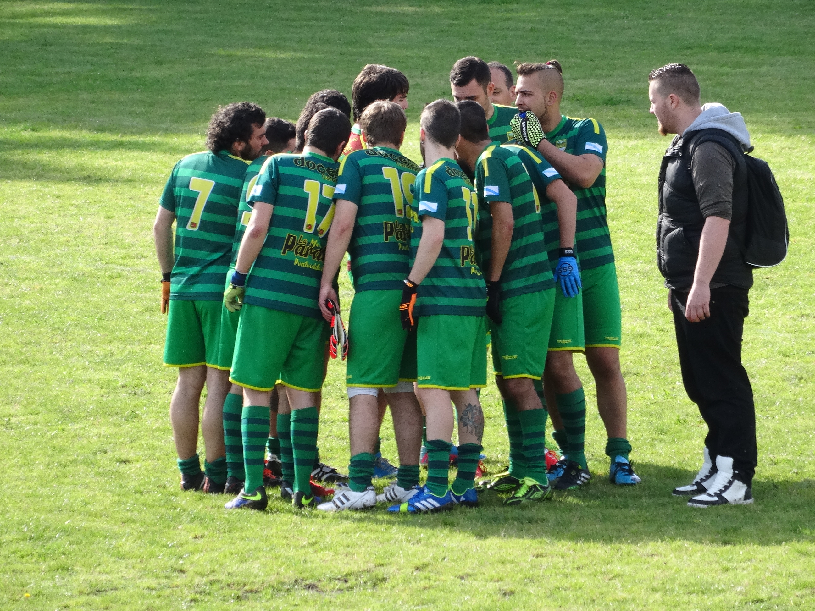 Concentración do Pontevedra FG antes do partido contra os Irmandinhos da Estrada no Torneo Ibérico de Fútbol Gaélico do 2015 na Coruña.